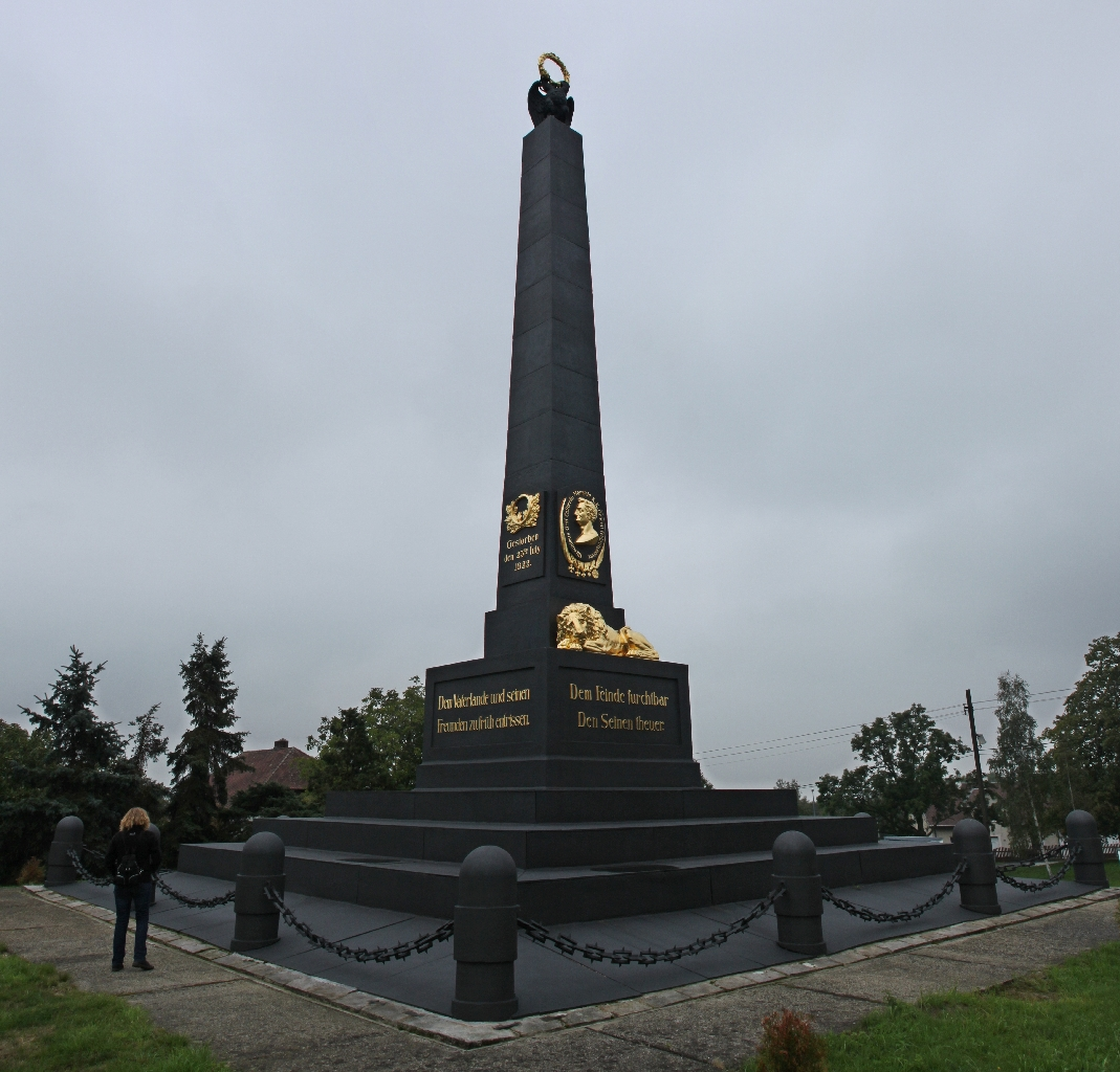 Arbesau (Varvažov): Blick auf das österreichische Denkmal in Erinnerung an die Schlacht bei Kulm 1813. Das Denkmal wurde 1825 nach einem Entwurf von Oberstleutnant Ourlandie errichtet wurde. Es handelt sich um einen gusseisernen Obelisk, dessen Teile in der Eisenhütte Neujoachimsthal (Nový Jáchymov) gegossen wurden. Mit einem Gewicht von 113 Tonnen und einer Höhe von 17 Metern handelt es sich um das bedeutendste Gusswerk der Hütte. Das Denkmal ist dem österreichischen General Hieronymus von Colloredo-Mansfeld (1775-1822) gewidmet, der hier am 17. September 1813 die Franzosen zum zweiten Male schlug. Das Denkmal krönt ein Doppeladler mit Lorbeerkranz. Bildhauer war Wenzel Prachner aus Prag.